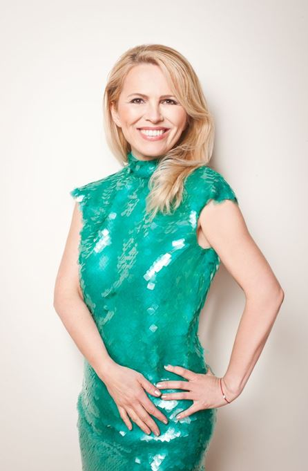 Anna Jurksztowicz (piosenkarka)